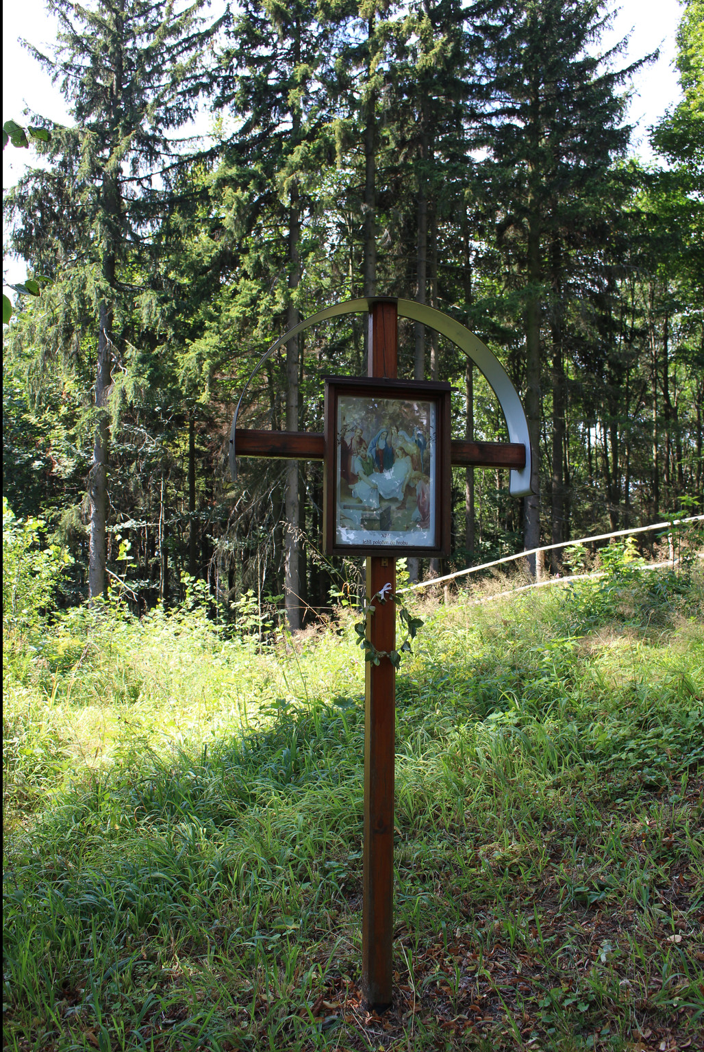 alej na Anenský vrch, Andělská Hora, okres Bruntál, Moravskoslezský kraj, XIV. zastavení - uložení Ježíše do hrobu